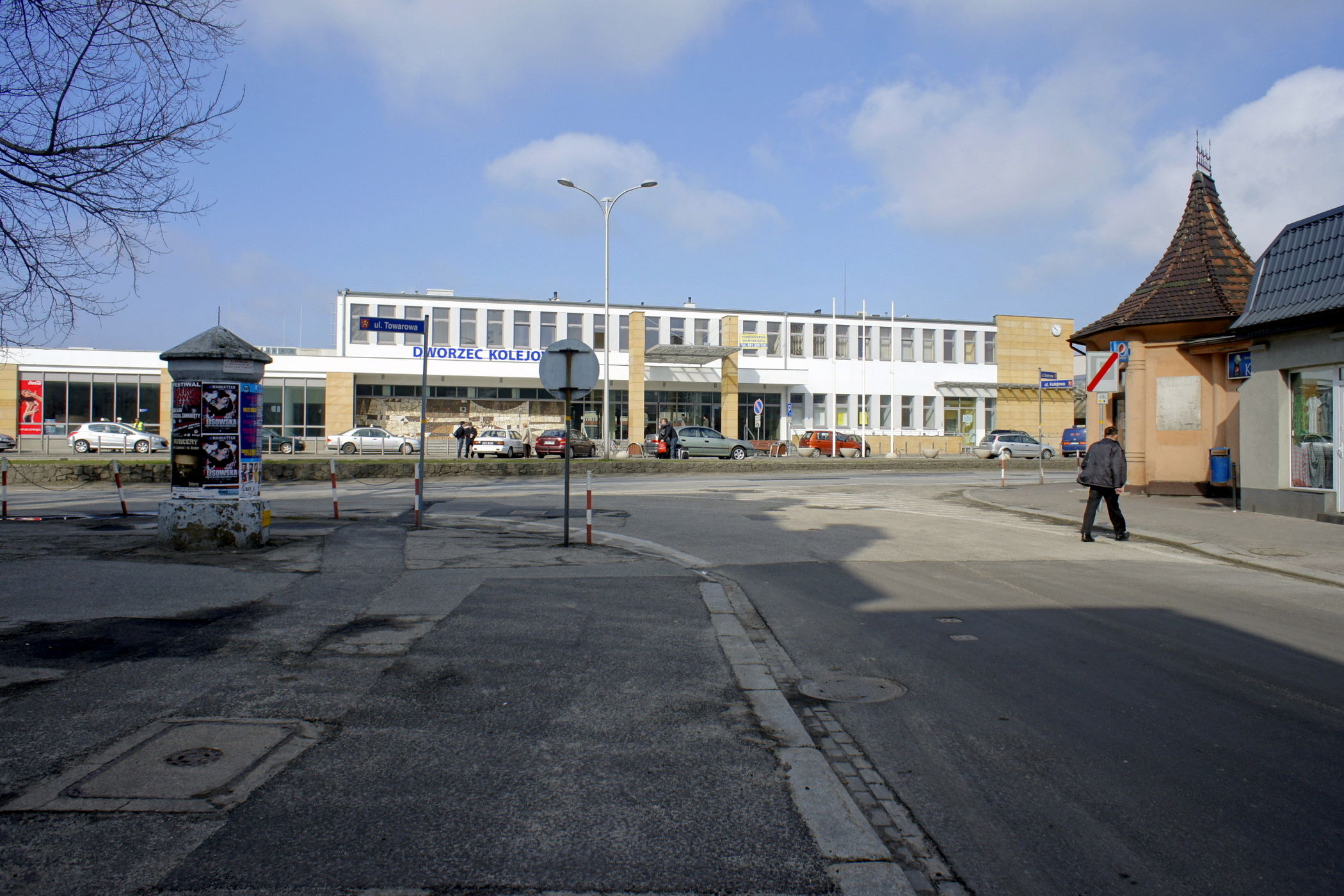 Stacja kolejowa w Ostrowie po remoncie ( zakończonym w 2011 r. )